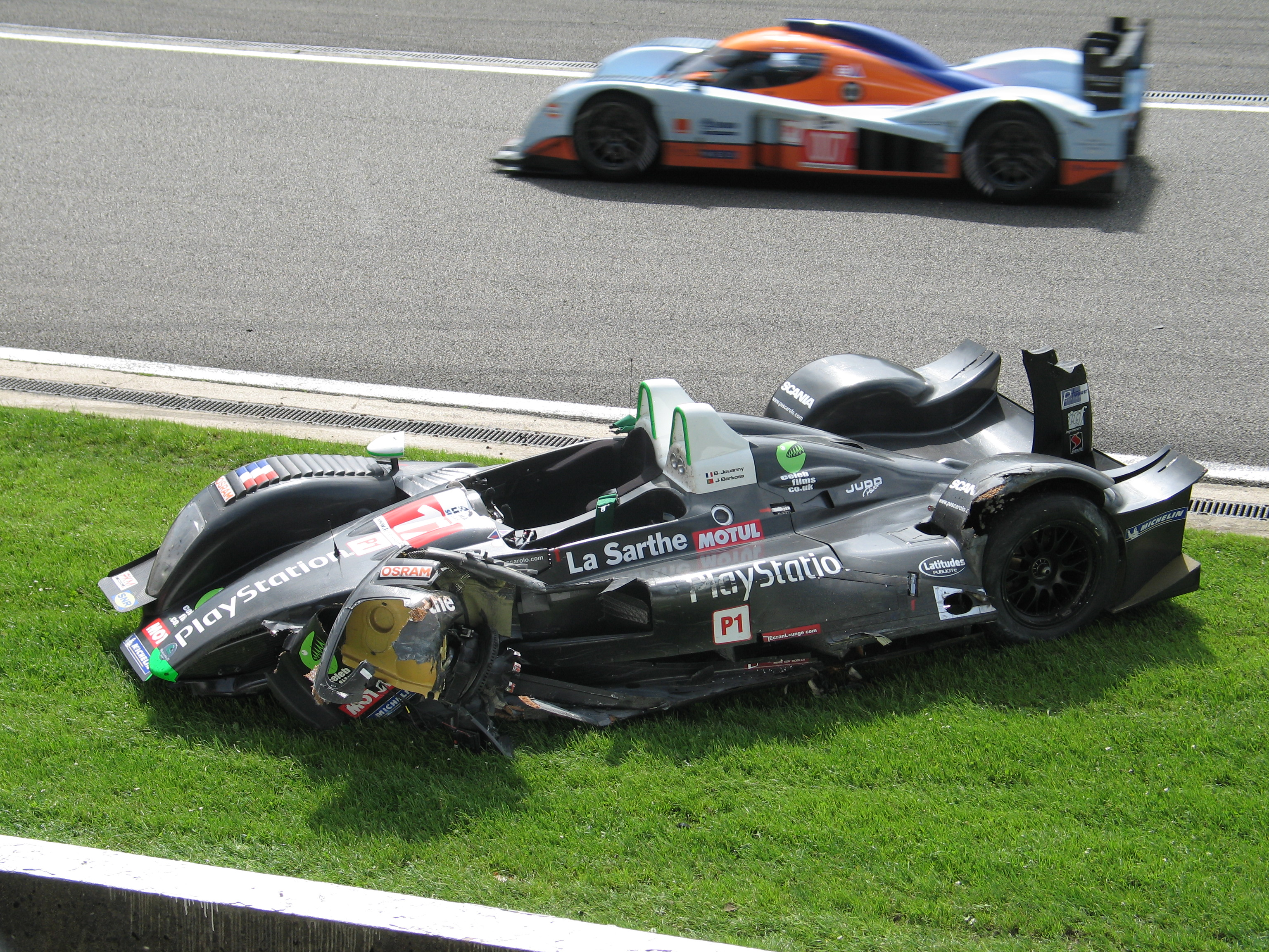 La Pescarlo nº17 après son accident lors des 1 000 kilomètres de Spa 2009.